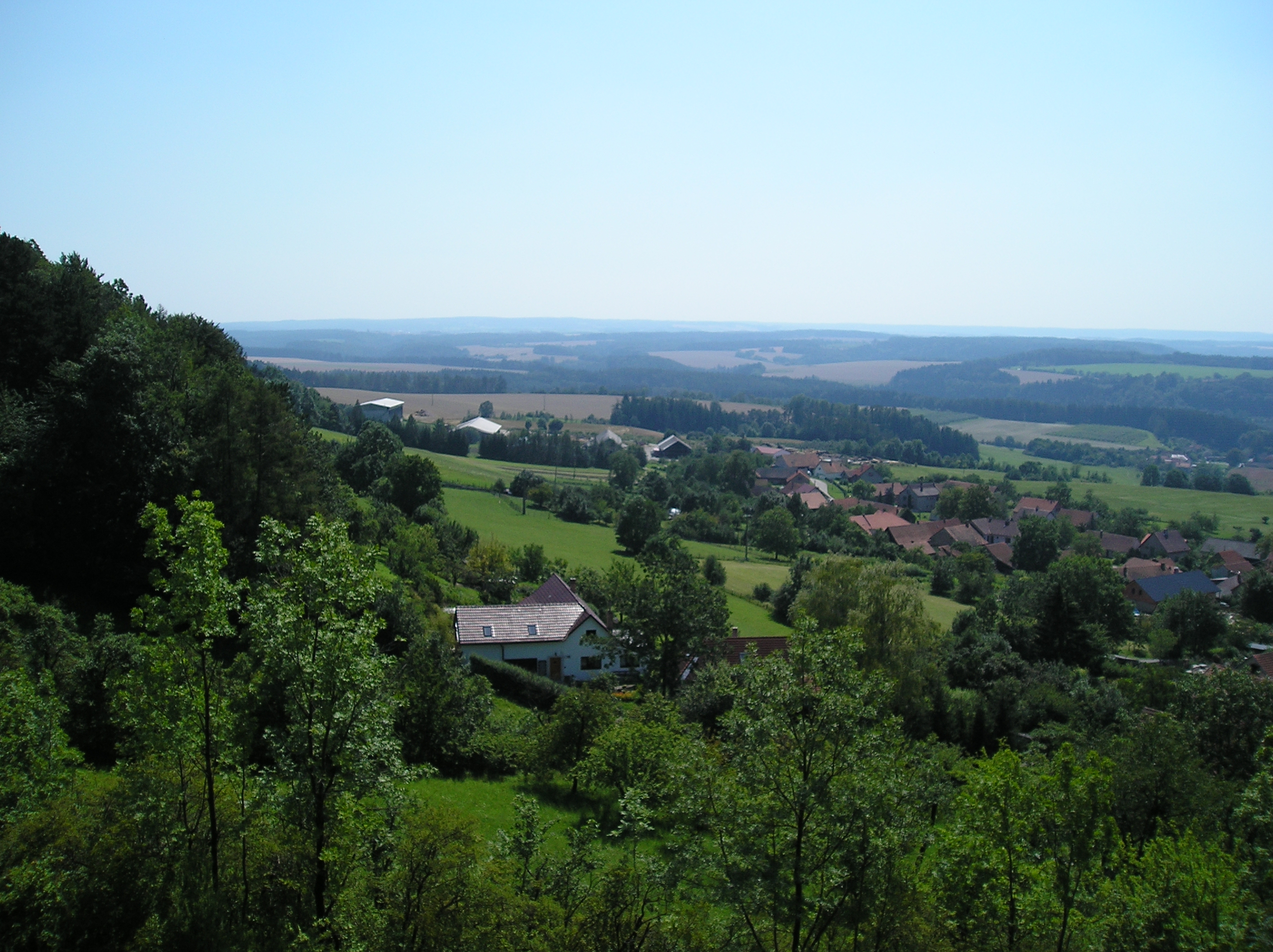 Výhled od Poklony na Střemošickou stráň (vlevo) a Střemošice.